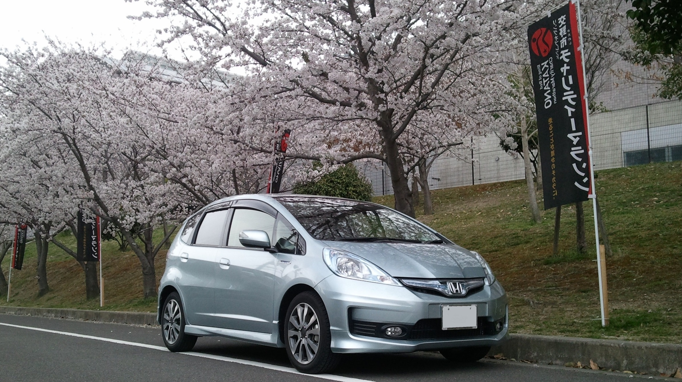 HONDA FIT HYBRID RS本田技研工業株式会社FIT HYBRID RS(DAA-GP4)